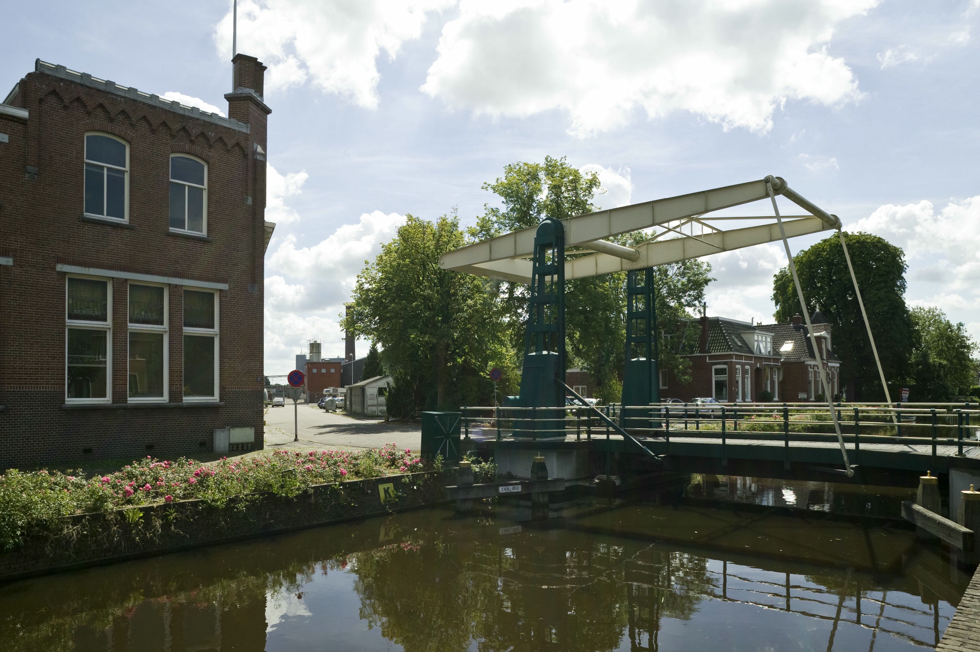 Schaftlokaal D.W.M.: Overzicht van de ligging in het straatbeeld